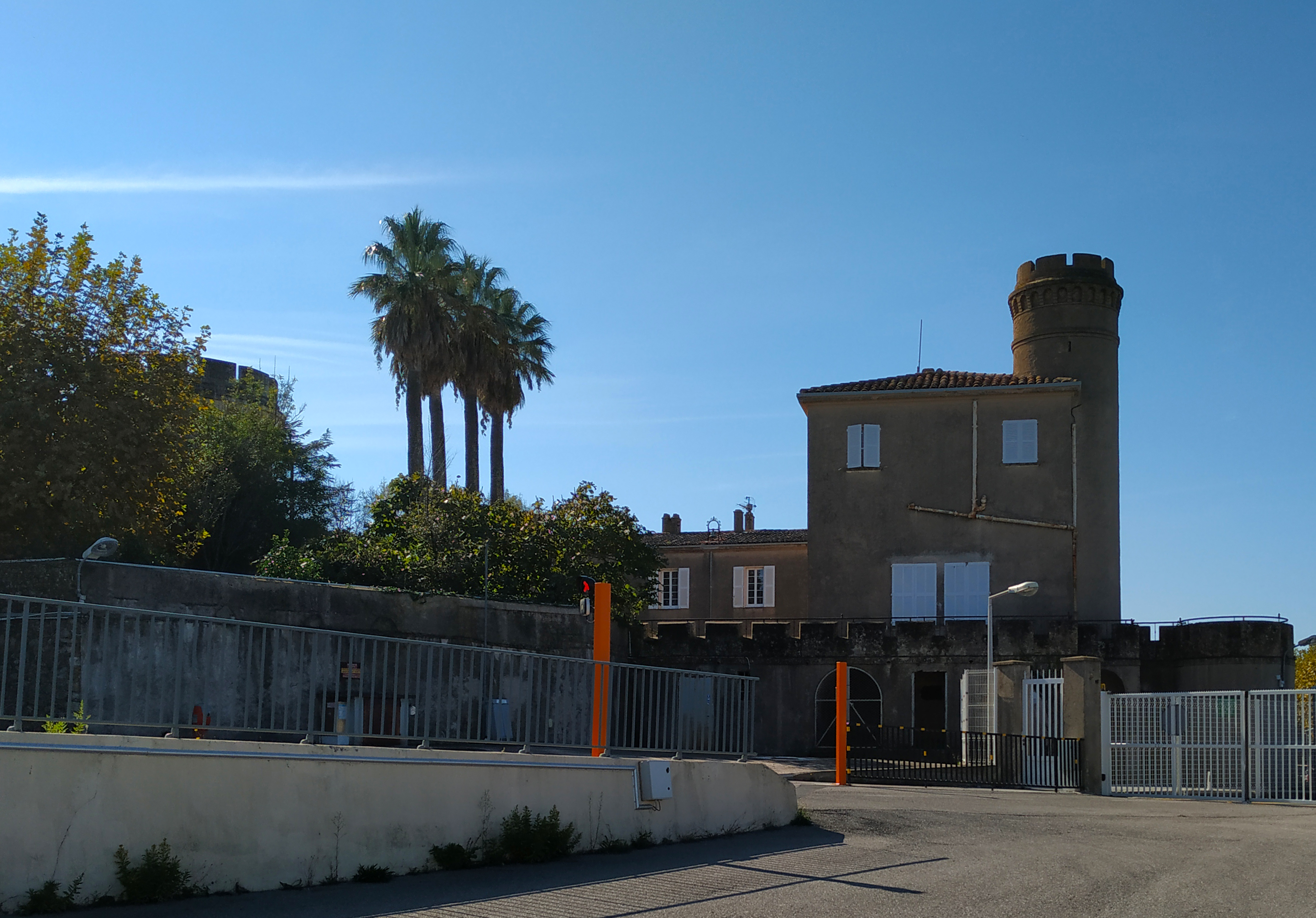 Façade nord-est du château Bertaud vue depuis le domaine maritime